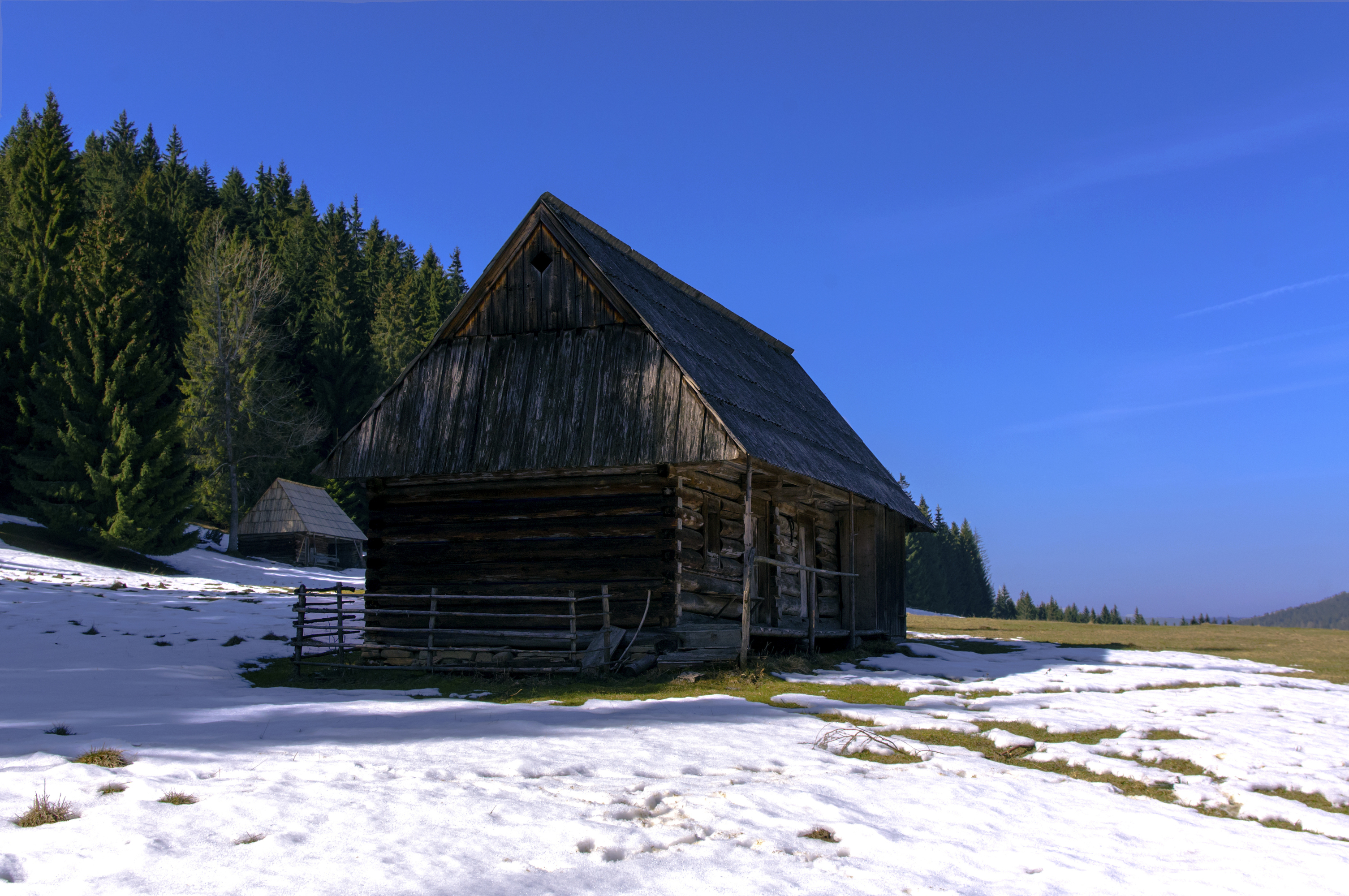 Szałas na polanie Molkówka